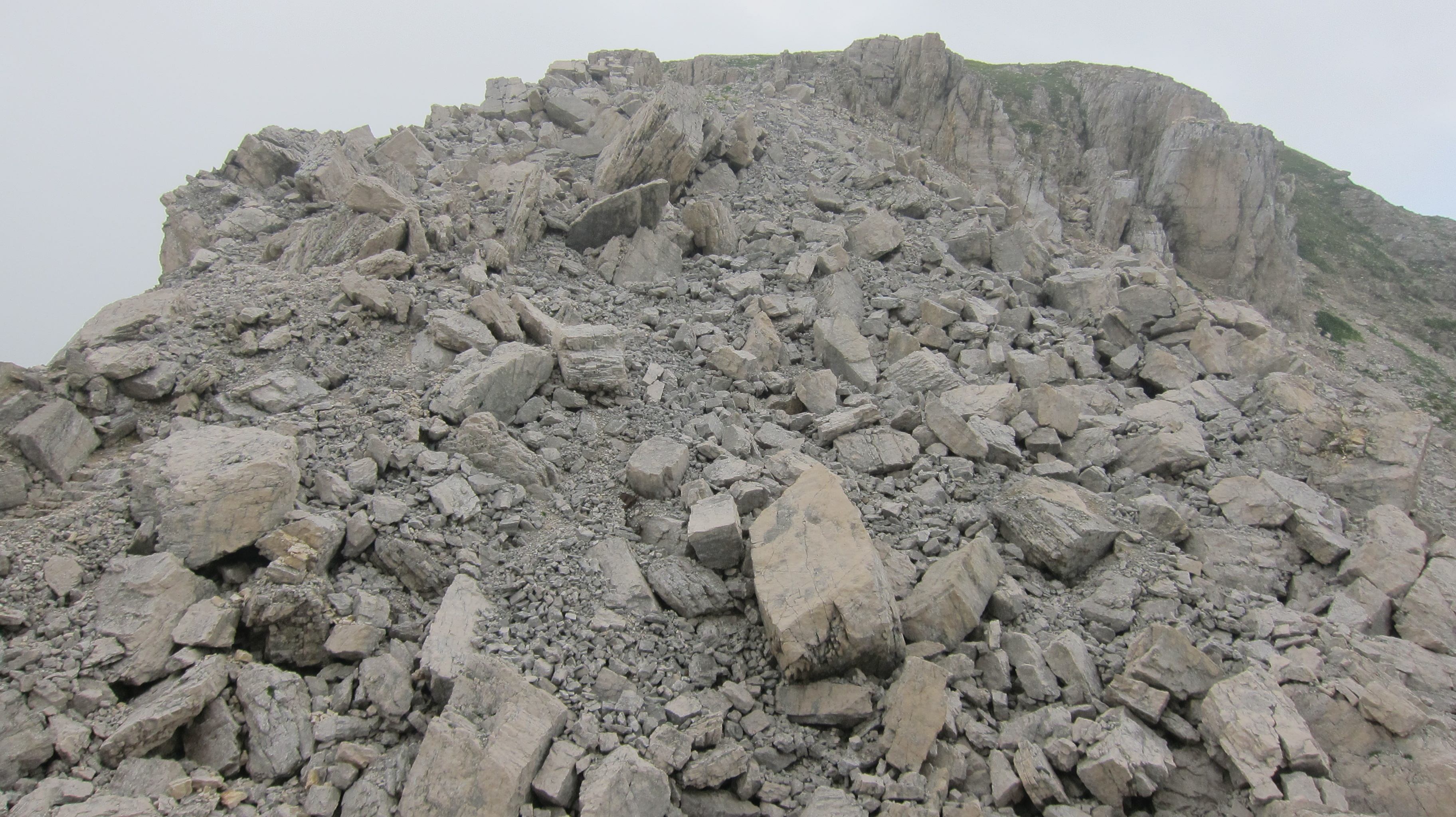 Monte Pasubio, Aufnahme der italienischen Seite des Eselsrücken nach der Sprengung. Aufnahme vom Juli 2012